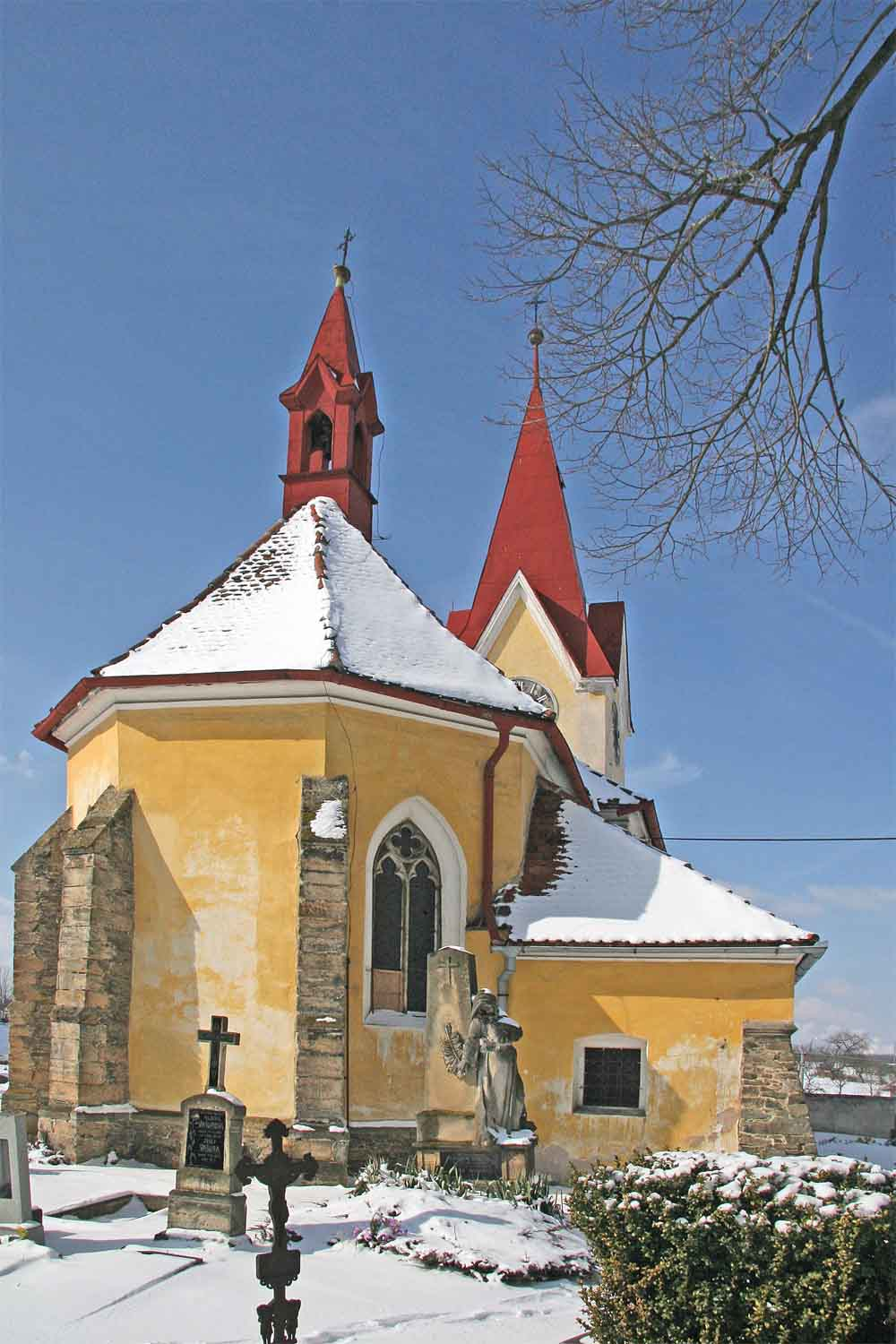 Pozdně gotický kostel Všech Svatých ve Stojicích